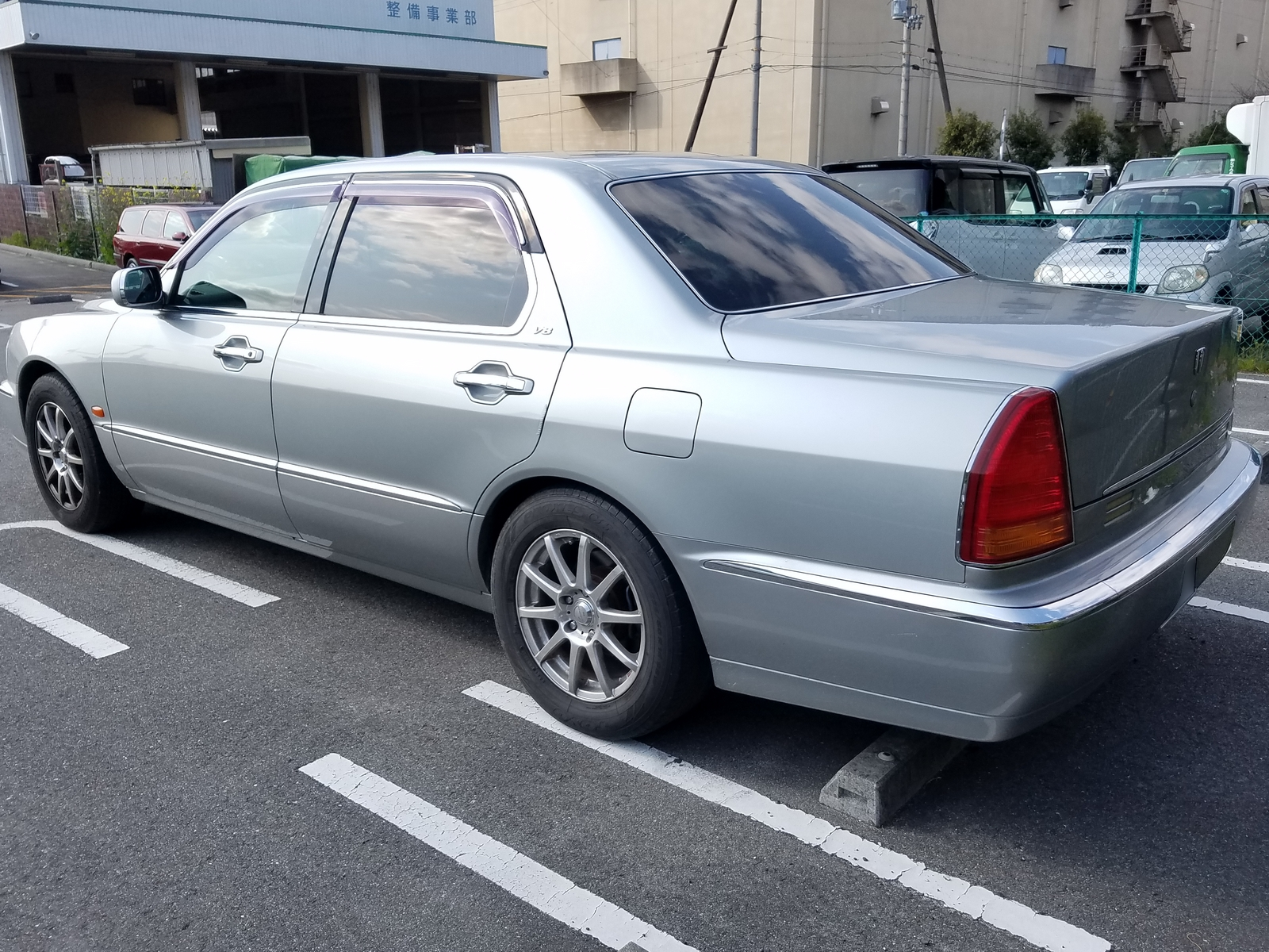 プラウディア C仕様